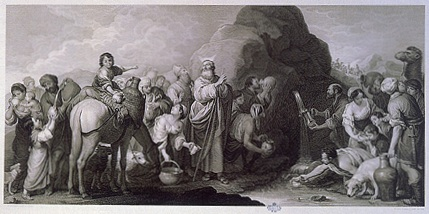 Las aguas de Moises - un grabado de Rafael Esteve Vilella siendo replica de una obra homónima de Murillo, siglo XIX